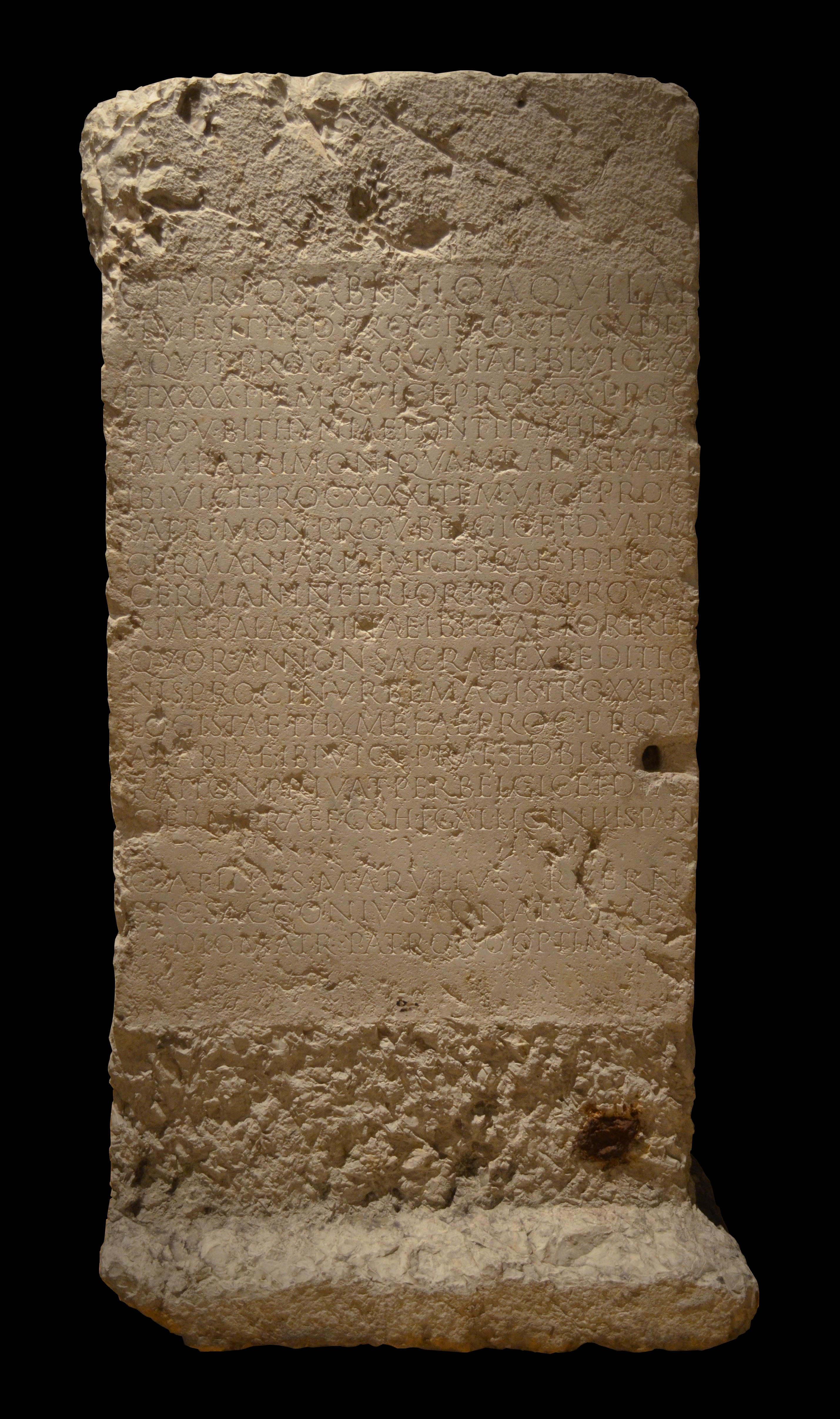 Musée gallo-romain de Fourvière (Lyon) : Piédestal de Caius Furius Sabinus Aquila Timesitheus dit Timésithée